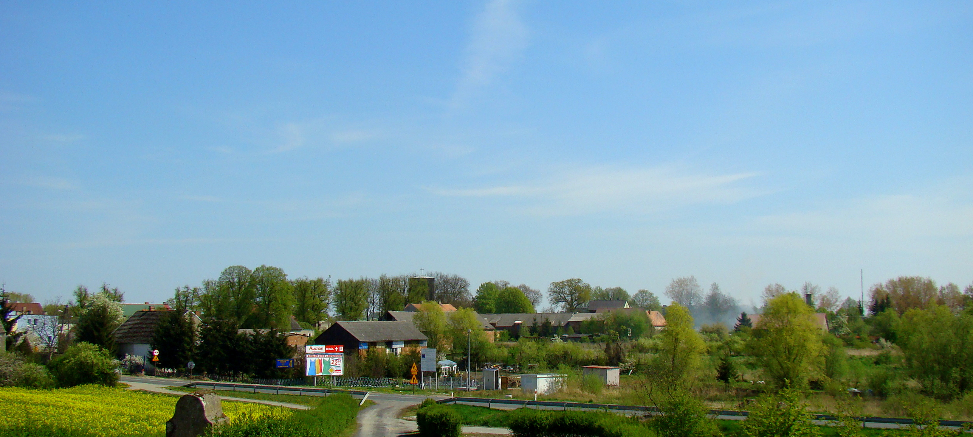 Kołbaskowo, (Gmina Kołbaskowo, Powiat policki, Województwo zachodniopomorskie), Polska